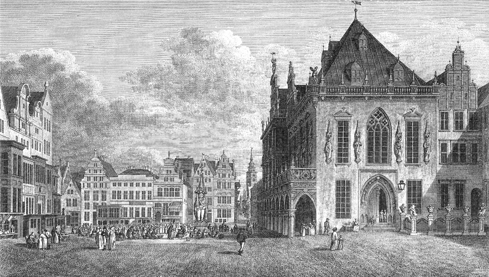 Bildvorlage von Anton Radl (1774–1852) aus dem Jahr 1818/1819: Rathaus und Markt